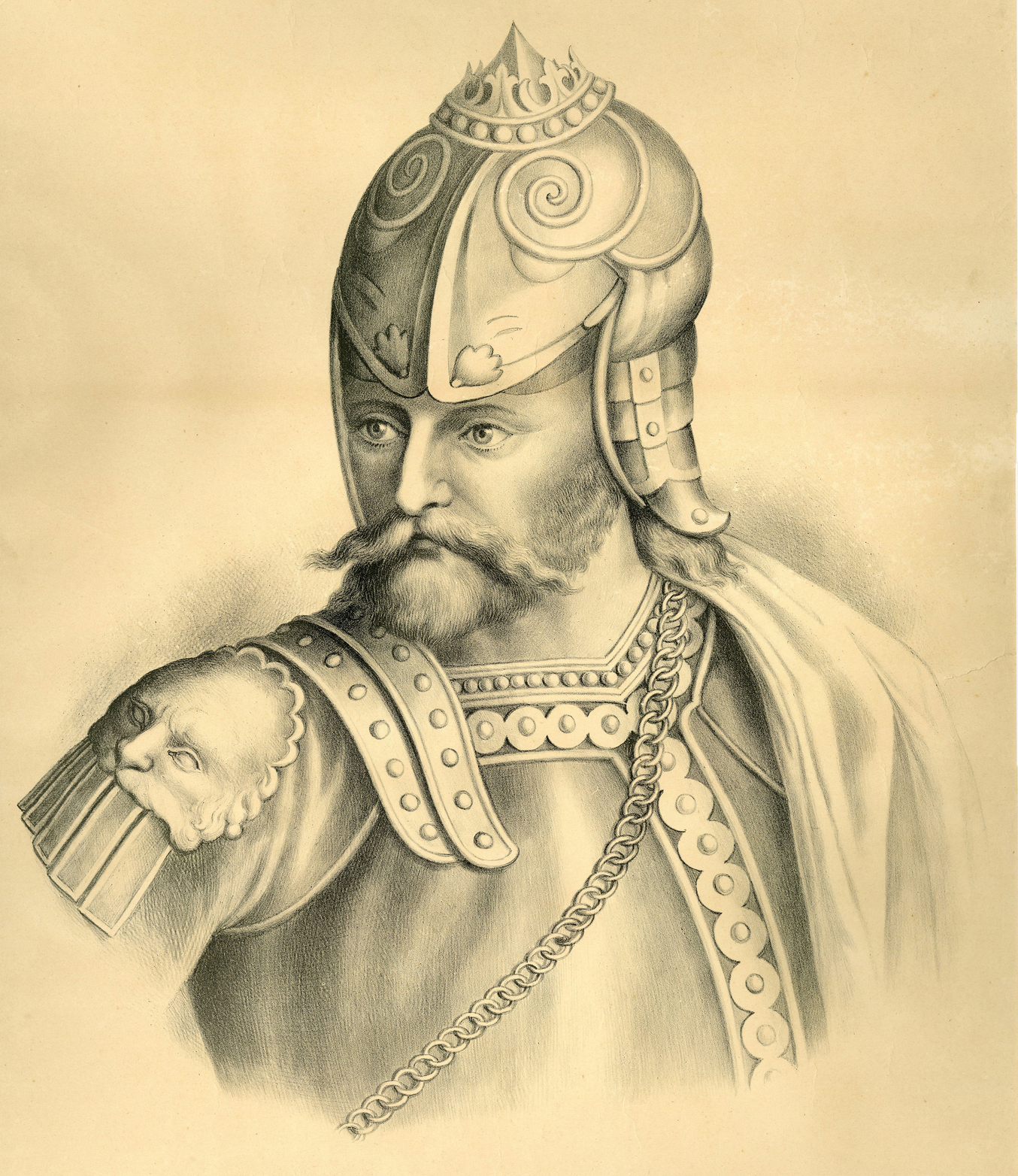 Беларуская (тарашкевіца): Уяўны партрэт вялікага князя Гедзіміна (Giedzimin)